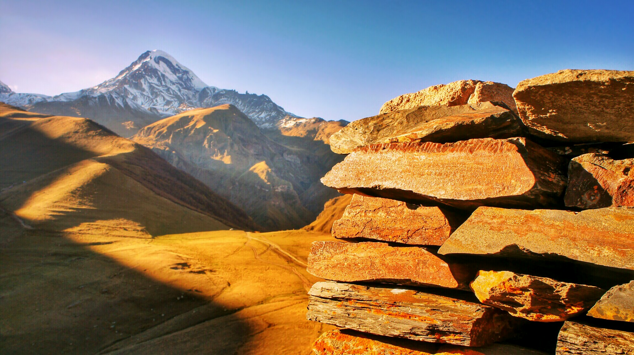 Kasbek Mt. Sunset Dsminda Sameba Gergeti Stephantsminda